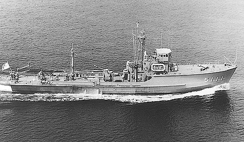 海洋観測艇1号